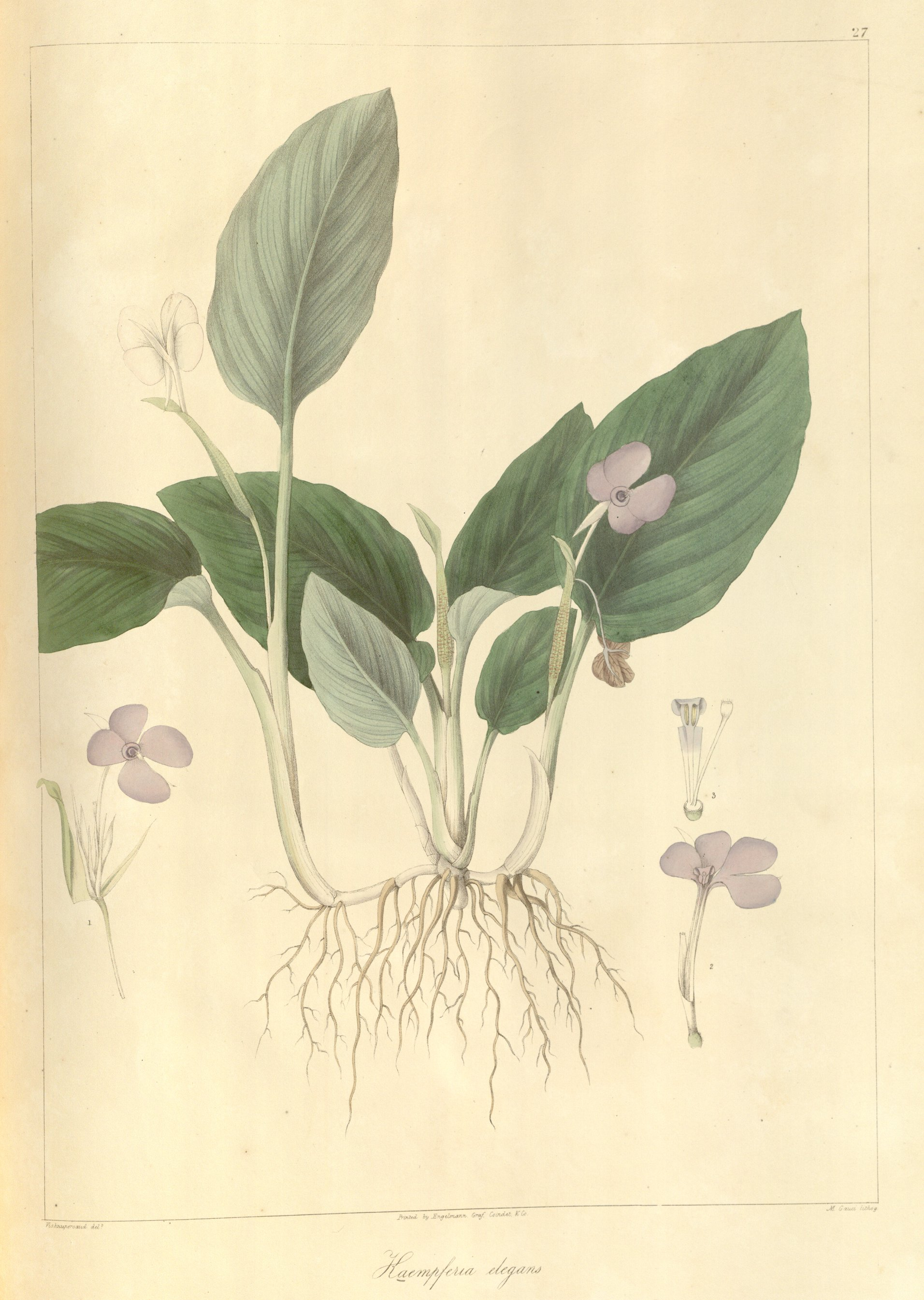 Kaempferia elegans (Wall.) Baker Planche 27 du "Plantae Asiaticae Rariores" de Nathaniel Wallich Vol 1 année 1830